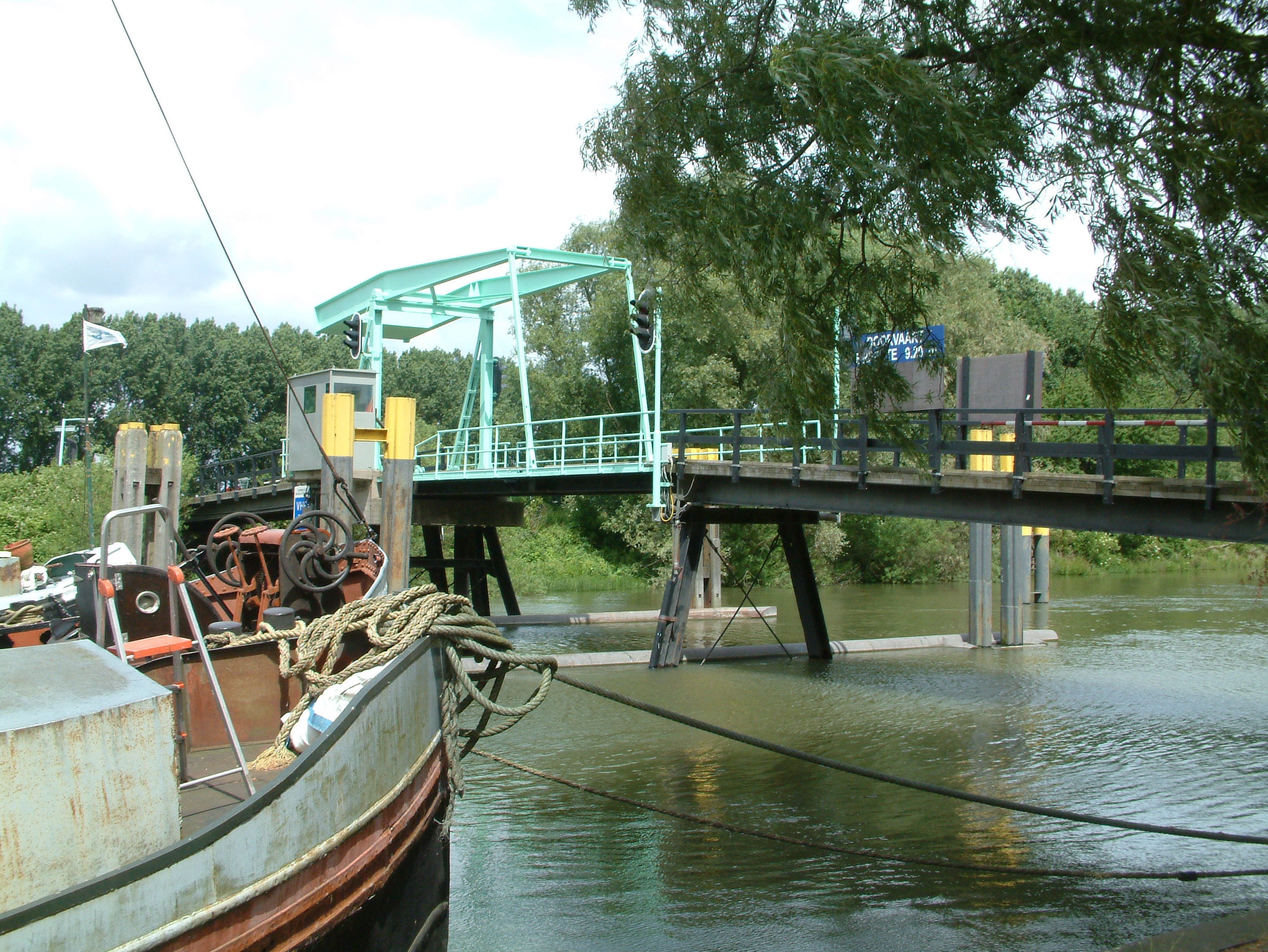 De Zuiddiepbrug van en naar het Van Brienenoord.